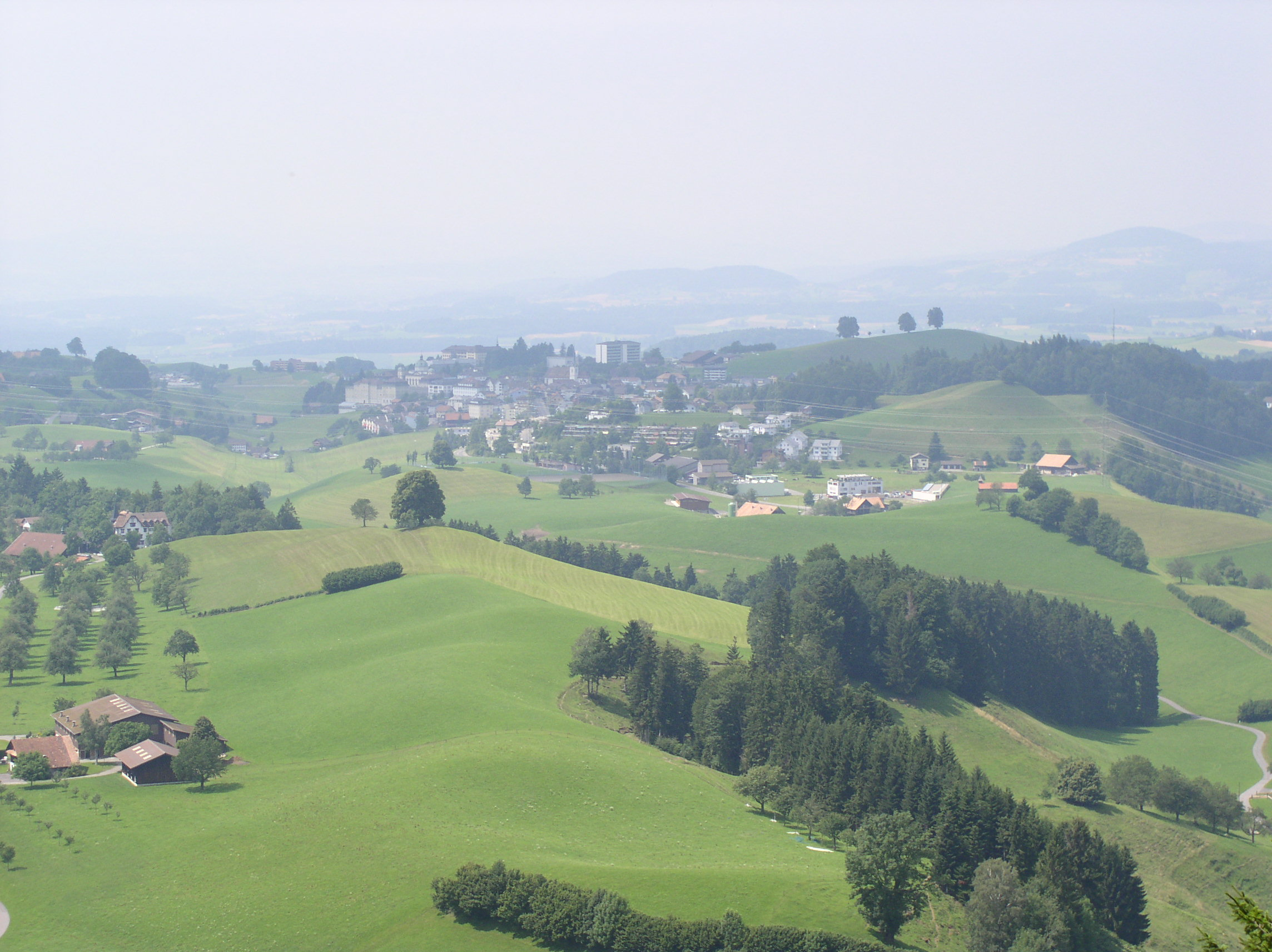 Description: Obersicht aus der Ferne auf die Gemeinde Menzingen Source: photo taken by me, July 2005 Photographer: Baikonur